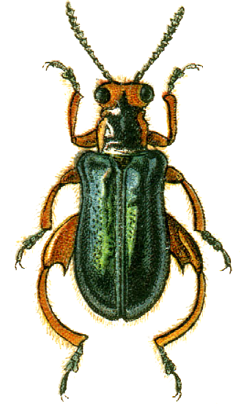 Clytraxeloma cyanipennis Kraatz, 1879